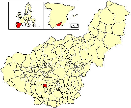 Situación del término municipal de Villamena respecto a la provincia de Granada, en España.